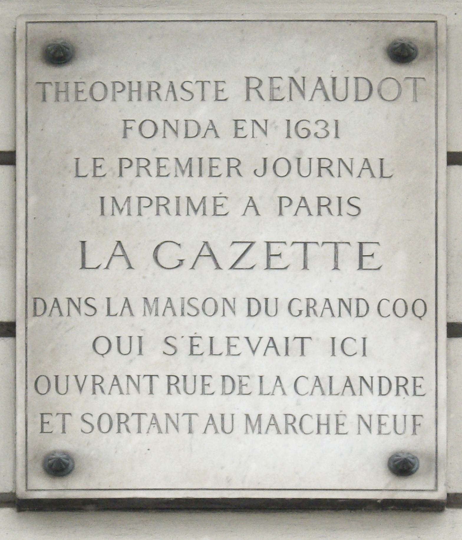 Plaque apposée au n° 8 du quai du Marché-Neuf, Paris 1er.« Théophraste Renaudot fonda en 1631 le premier journal imprimé à Paris, La Gazette, dans la maison du Grand Coq qui s'élevait ici, ouvrant rue de la Calandre et sortant au Marché Neuf. »